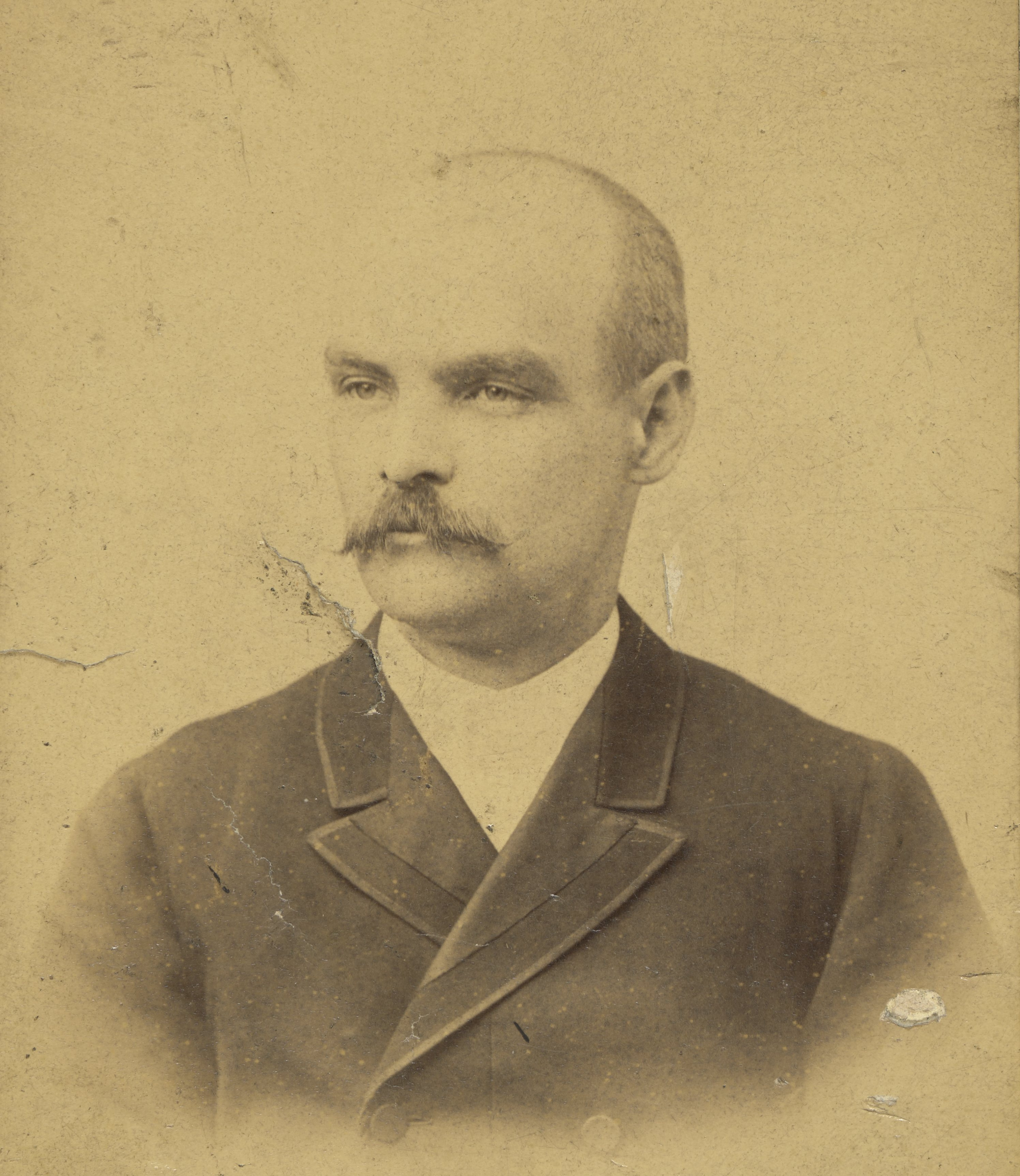 Zdjęcie Teodora Jeske-Choińskiego